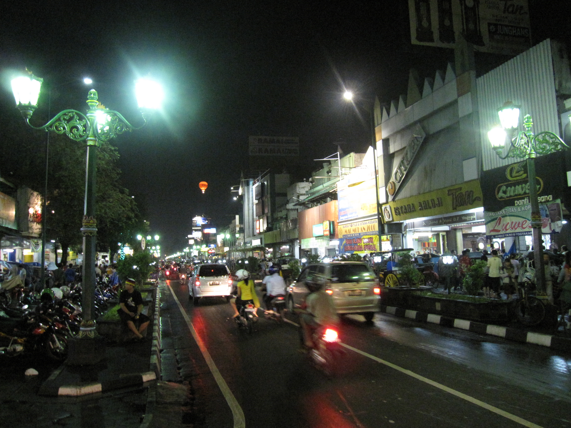 Jalan Malioboro in Yogyakarta